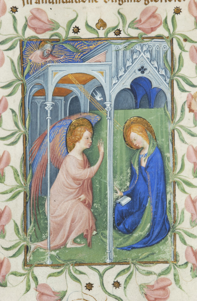 Page from codex «Libro d’Ore» (Bodmer Codex)